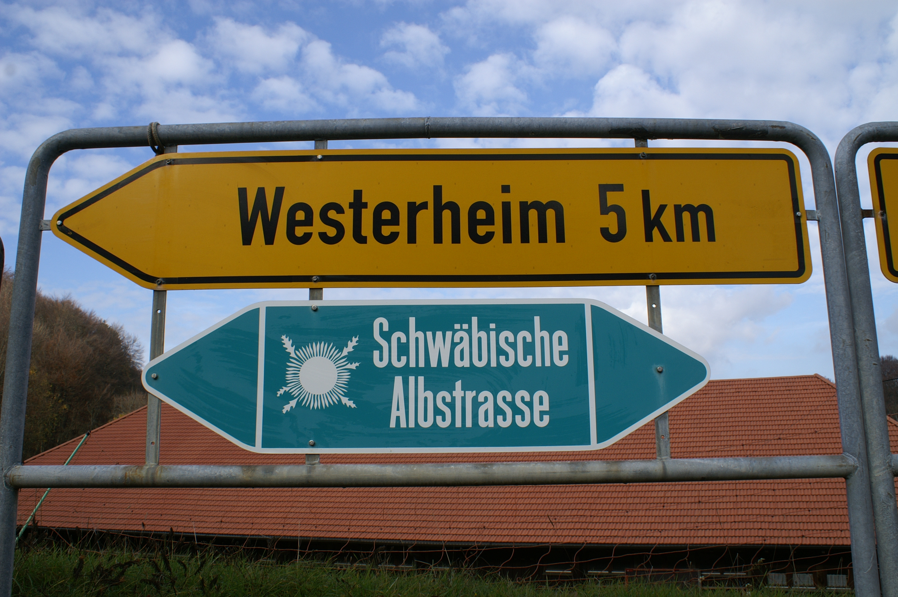 Von Hohenstadt kommend führt die Schwäbische Albstraße links ab nach Westerheim, rechts führt sie ins Filstal nach Wiesensteig